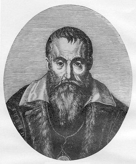 Joseph Justus Scaliger Joseph Justus Scaliger